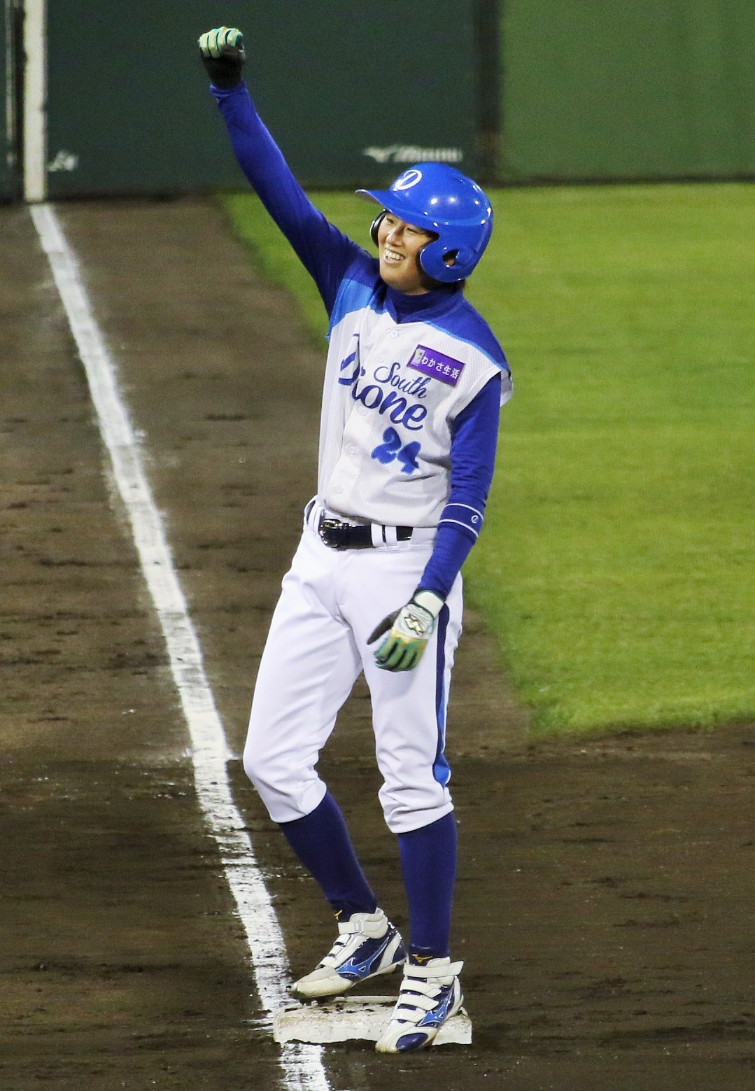 サウス・ディオーネ選手の川崎ひかる。わかさスタジアム京都にて。